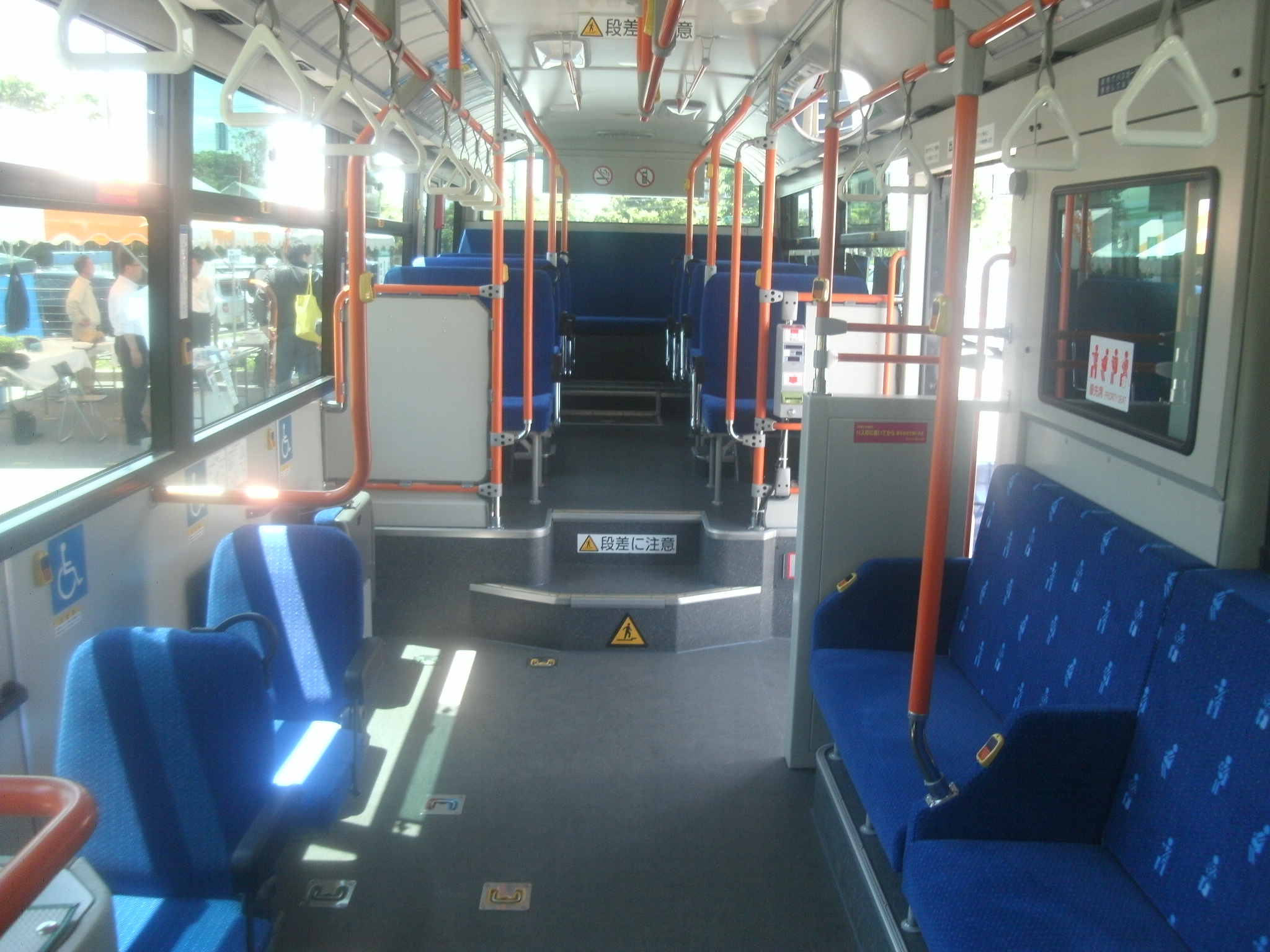 車内（2014年5月、イベント会場に展示されている実物を撮影）